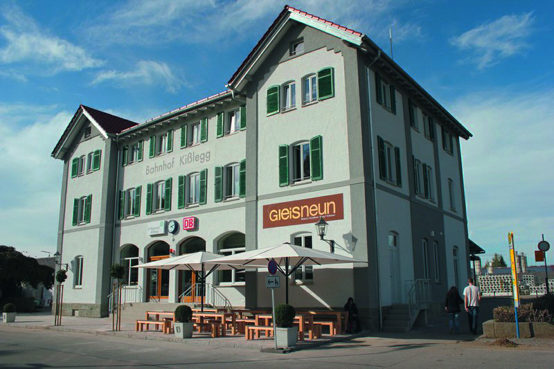 neuer Bahnhof in Kißlegg